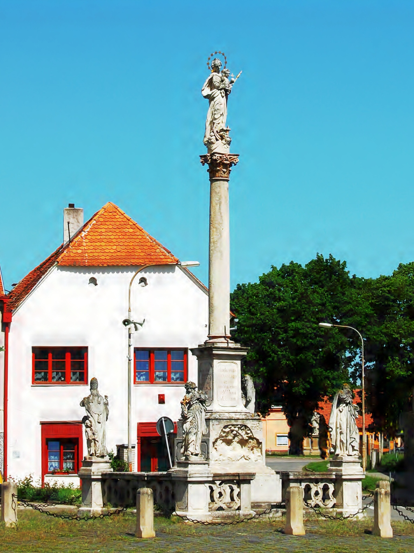 Sloup se sousoším - Morový sloup (Hostěradice), nám., Hostěradice